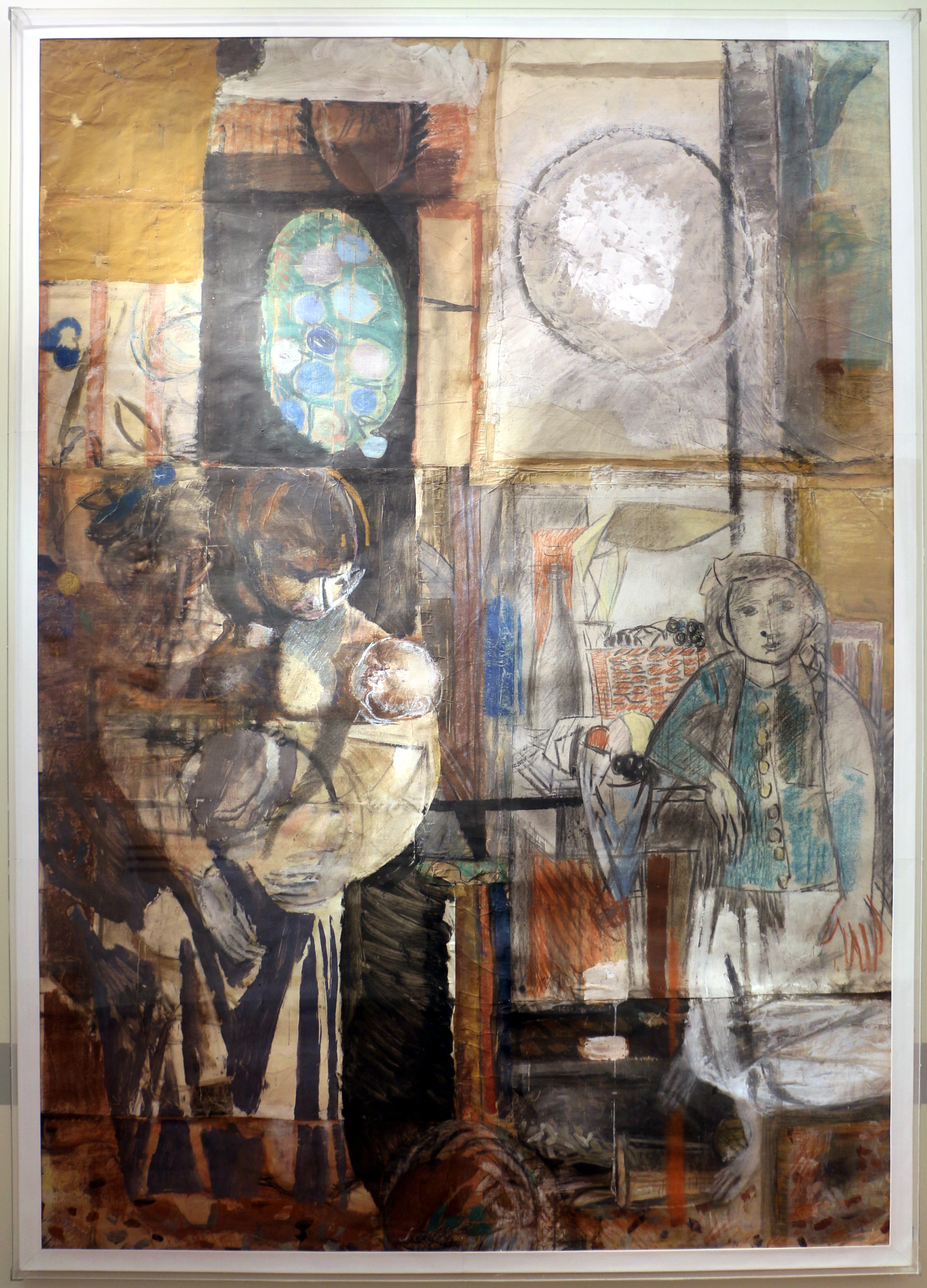 Collezione Mosaici Moderni - NB: Museum explicitly authorized the upload of its contemporary art collection for WLM 2016 (for further info ask WLM Italy organizators). This is a photo of a monument which is part of cultural heritage of Italy.